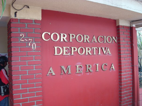 foto de la sede administrativa